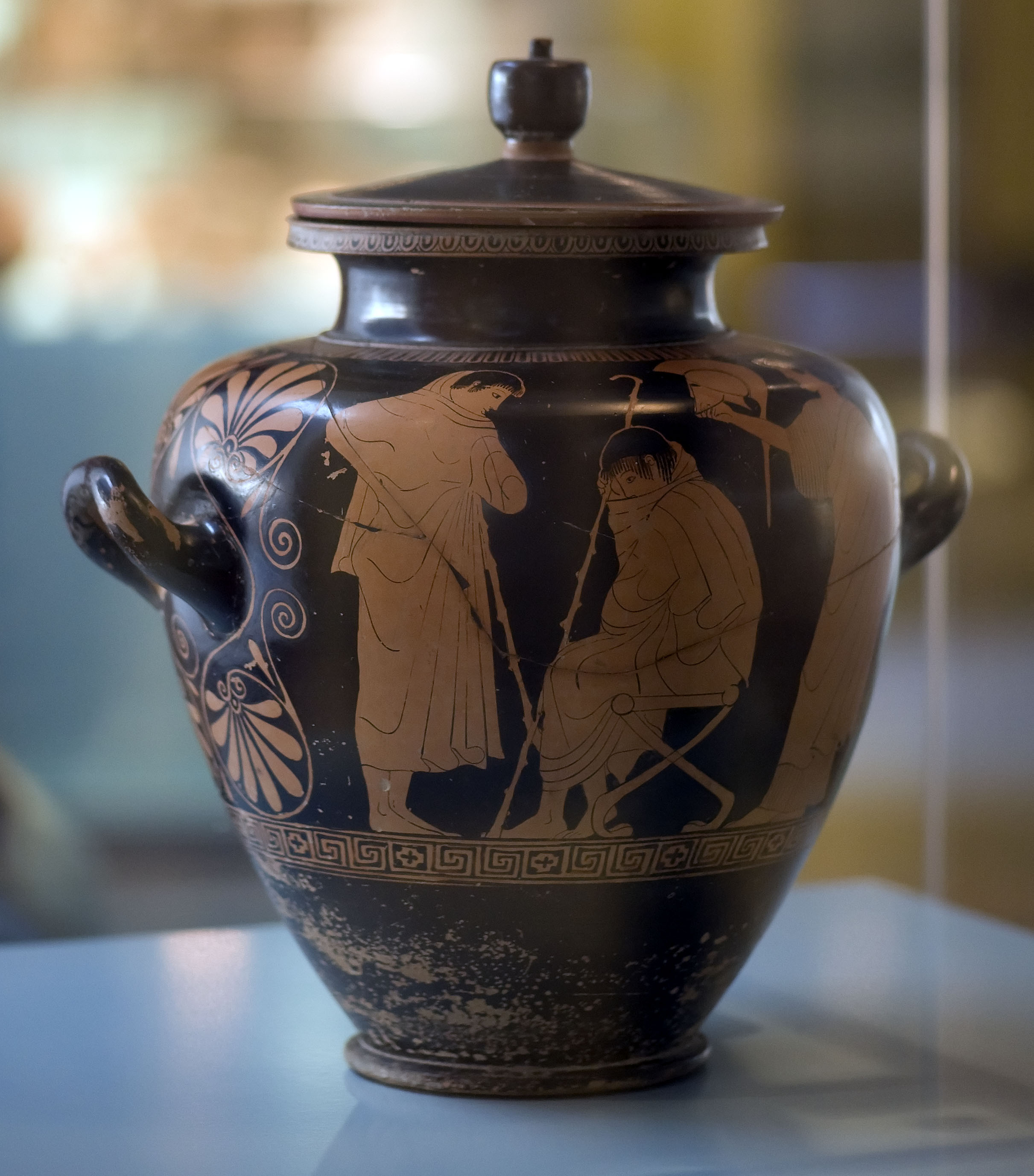 Vaas met afbeelding van Achilles Vaas met afbeelding van Achilles (RMO Leiden)